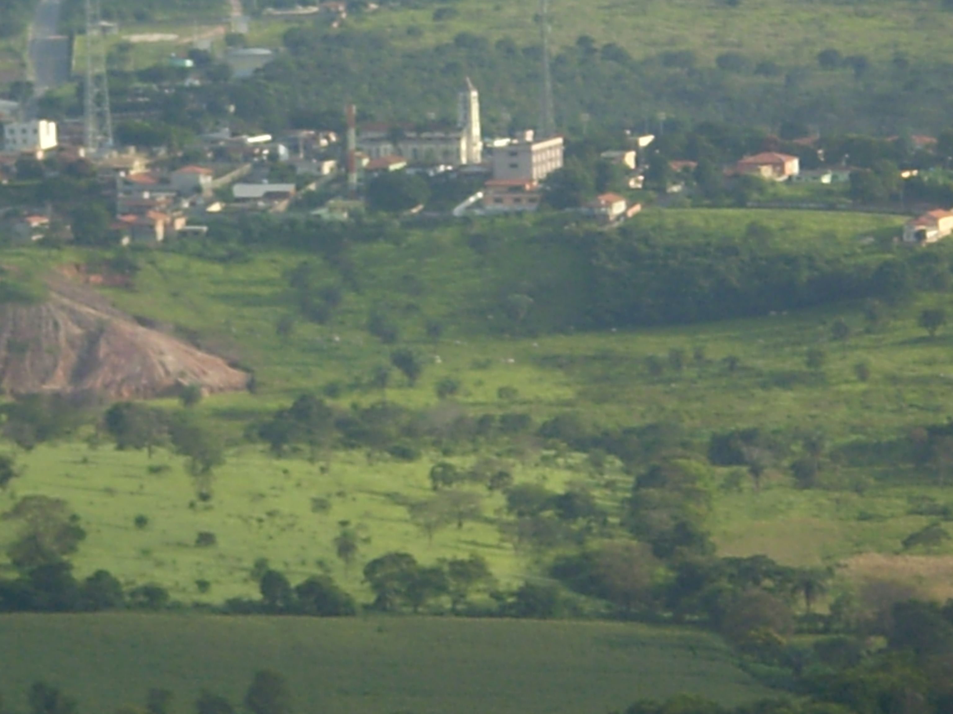 Igreja Matriz de Santo Antonio vista do Ponto Chick